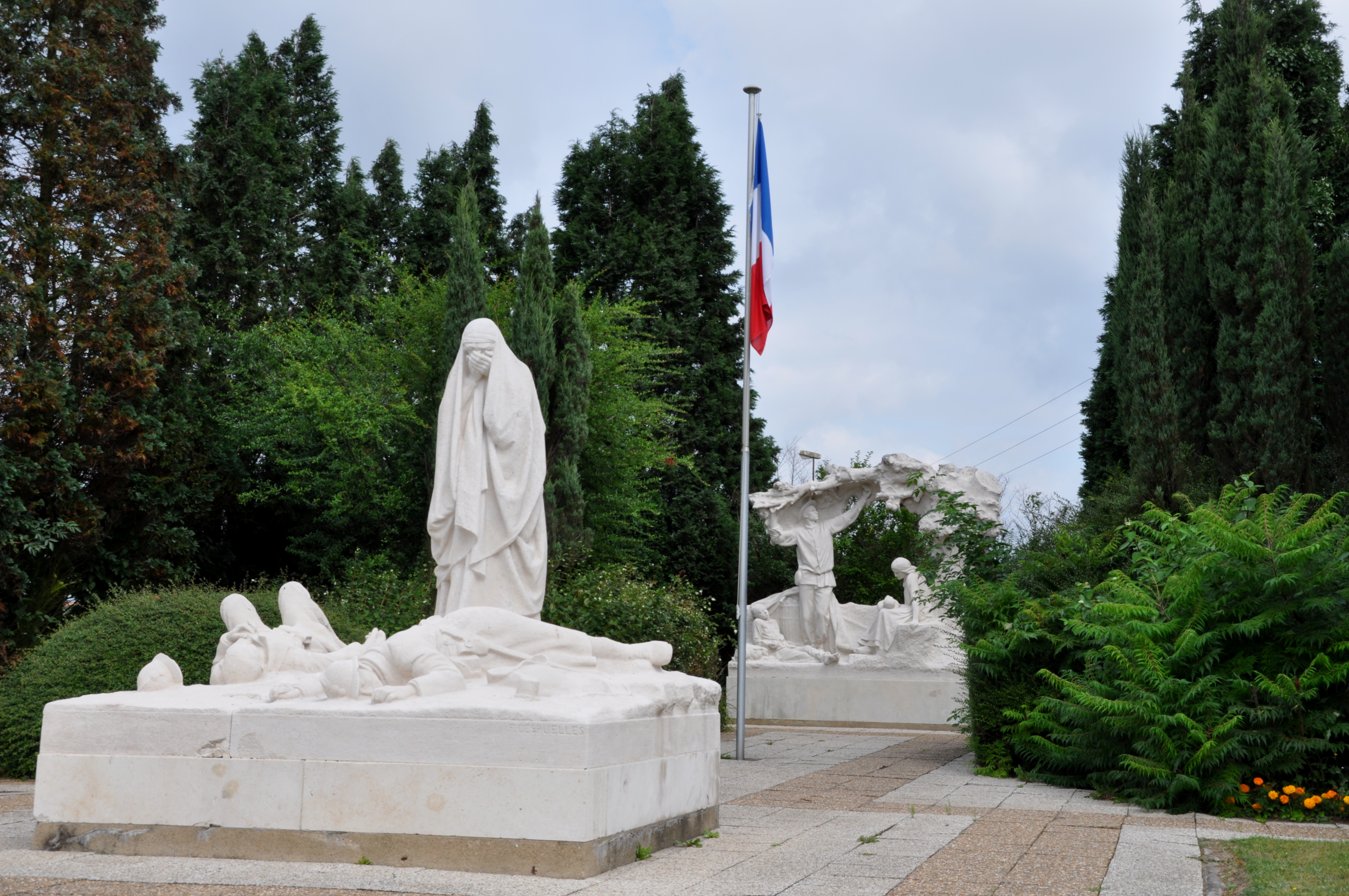 Félix Desruelles (Français, 1865-1943): Monument aux morts de la Première Guerre mondiale, Rue Jean-Jaurès, Auchel (Inscrit, 2009) .